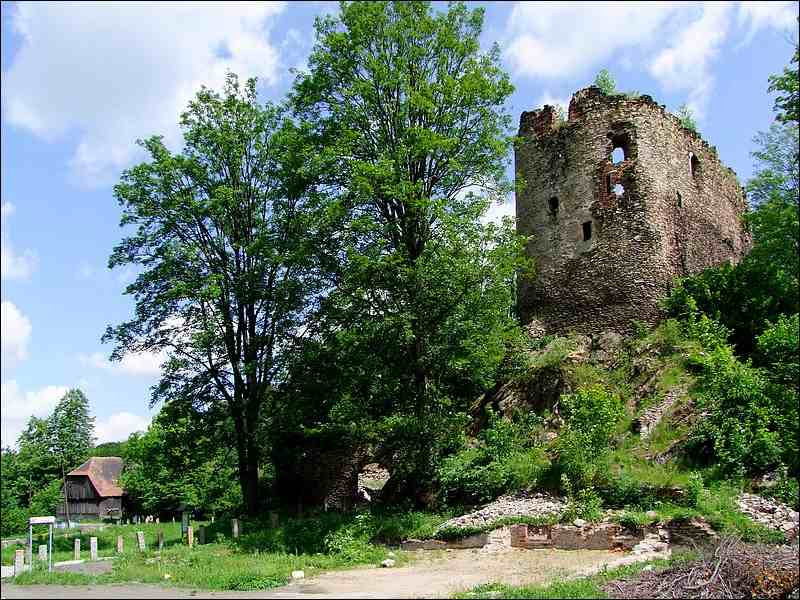 ruiny zamku, XIV/XVI, nr rej.: 130/788 z 26.10.1960